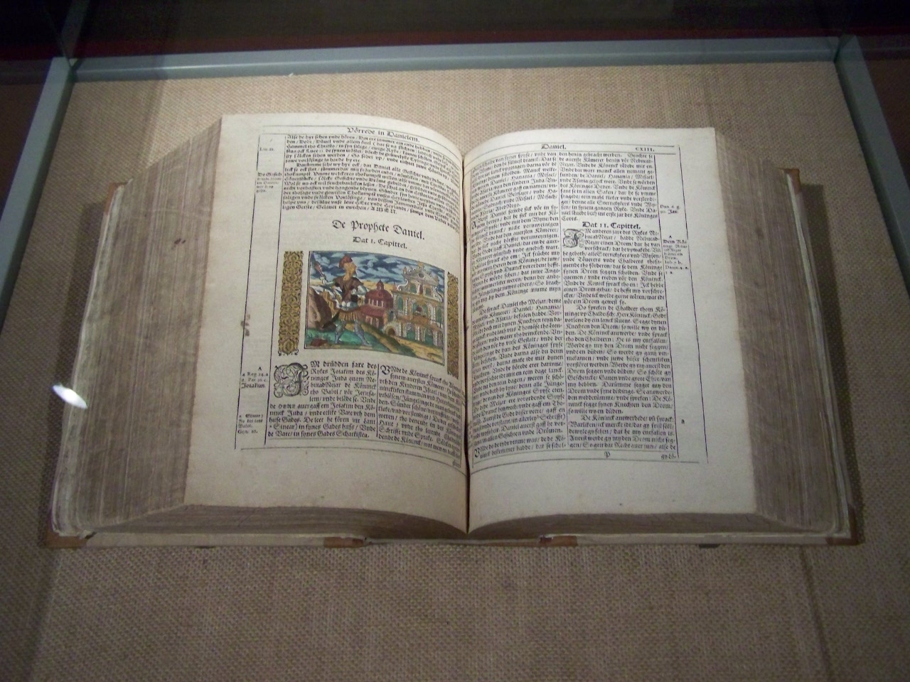 Barther Bibel im Bibelzentrum St. Jürgen in Barth, Vorpommern.